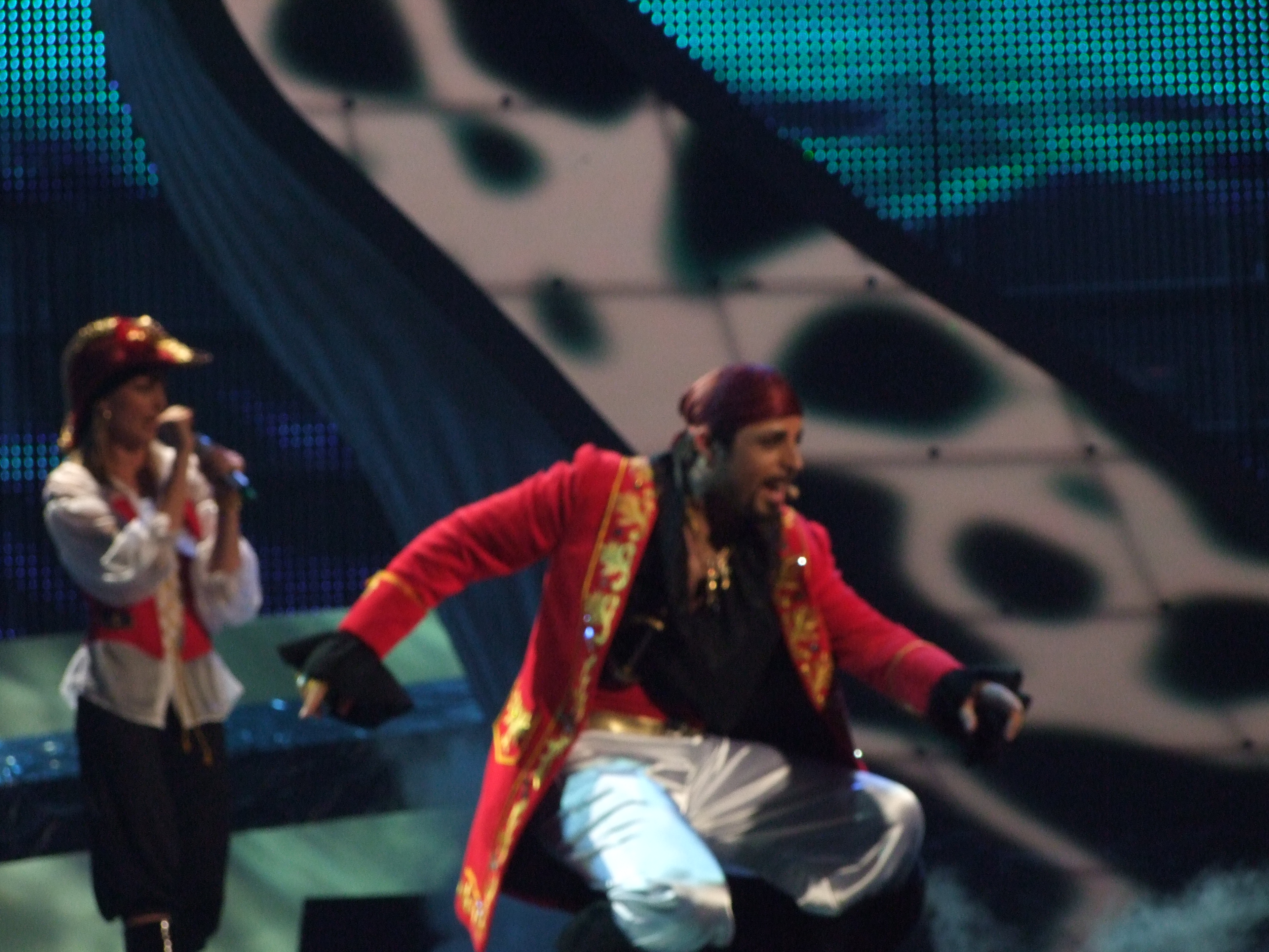 Semifinal 2 Eurovision 2008